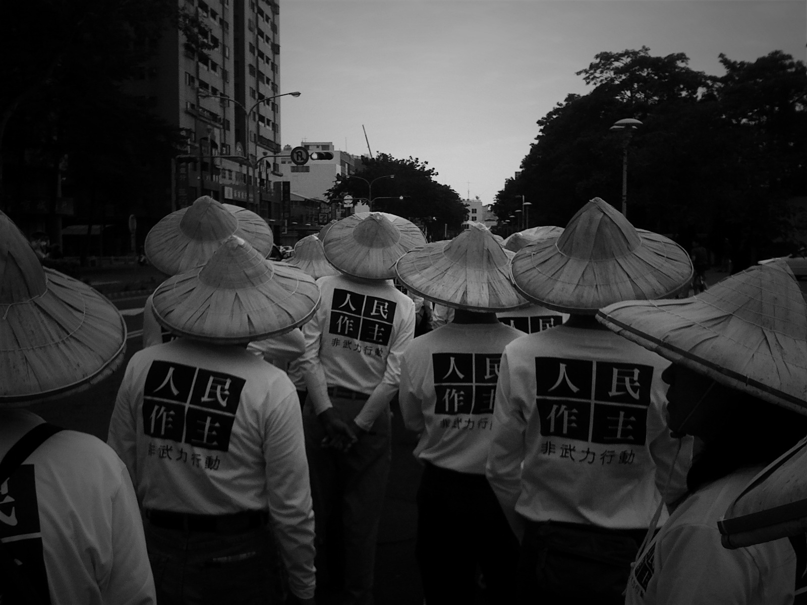 人民作主教育基金會 人民作主運動：台南市東寧運動公園→水萍塭公園 - 2